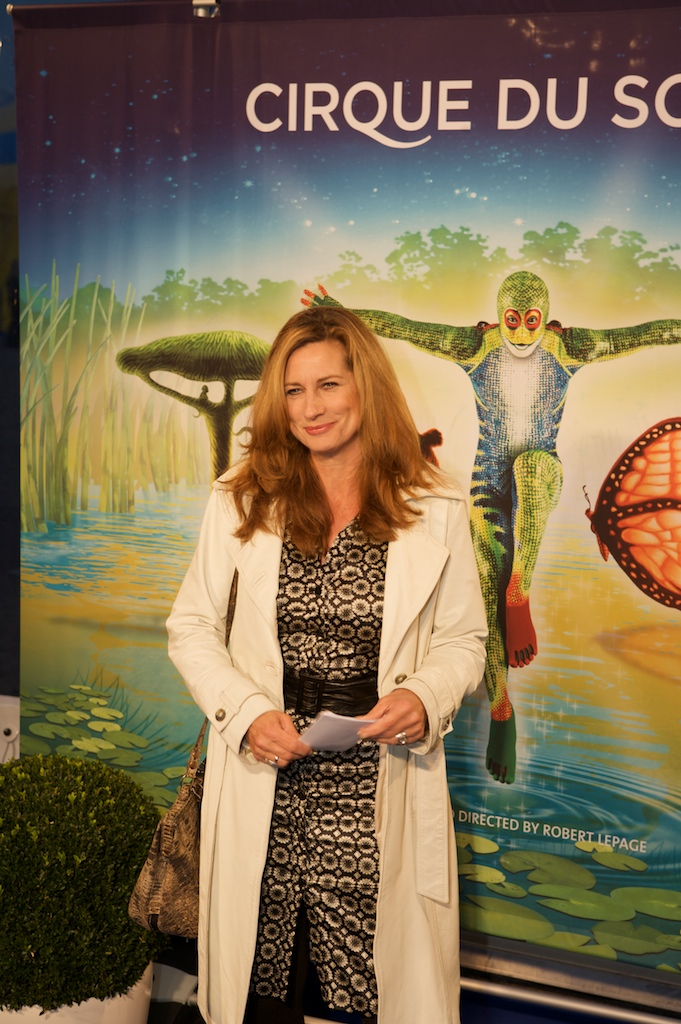 Carine Crutzen bij de Europese première Cirque du Soleil in Amsterdam